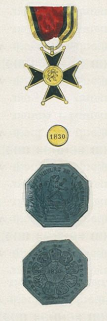 Belgisch IJzeren Kruis